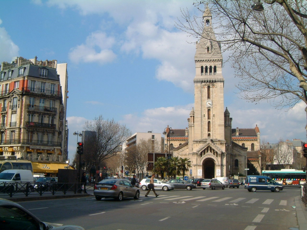 Photo perso du carrefour Alésia et l'église Saint-Pierre de Montrouge, centre du quartier du Petit-Montrouge, 75014 Paris